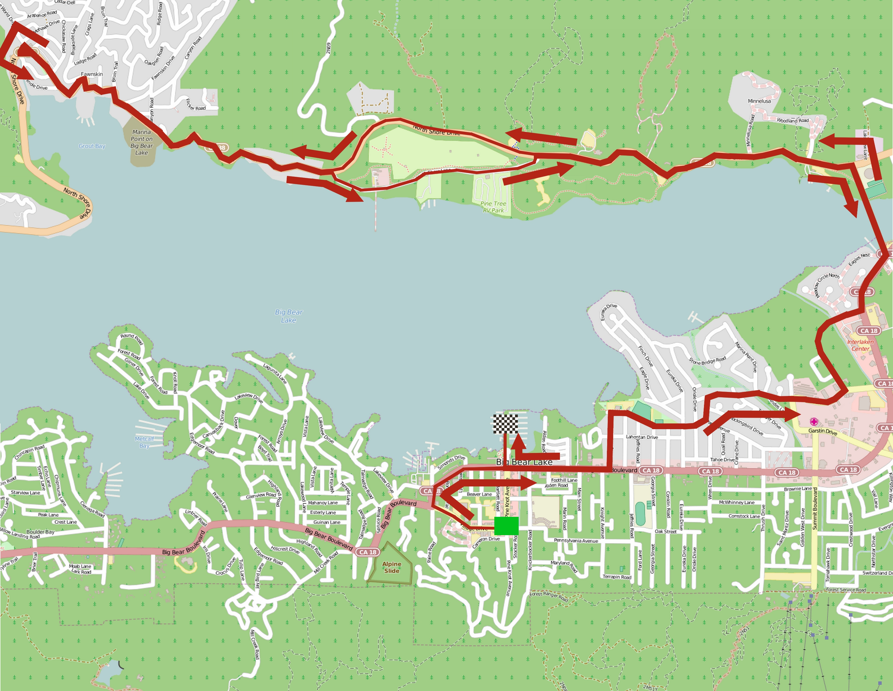 Parcours du contre-la-montre individuel de la sixième étape du Tour de Californie 2015. This map may be incomplete, and may contain errors. Don't rely solely on it for navigation.